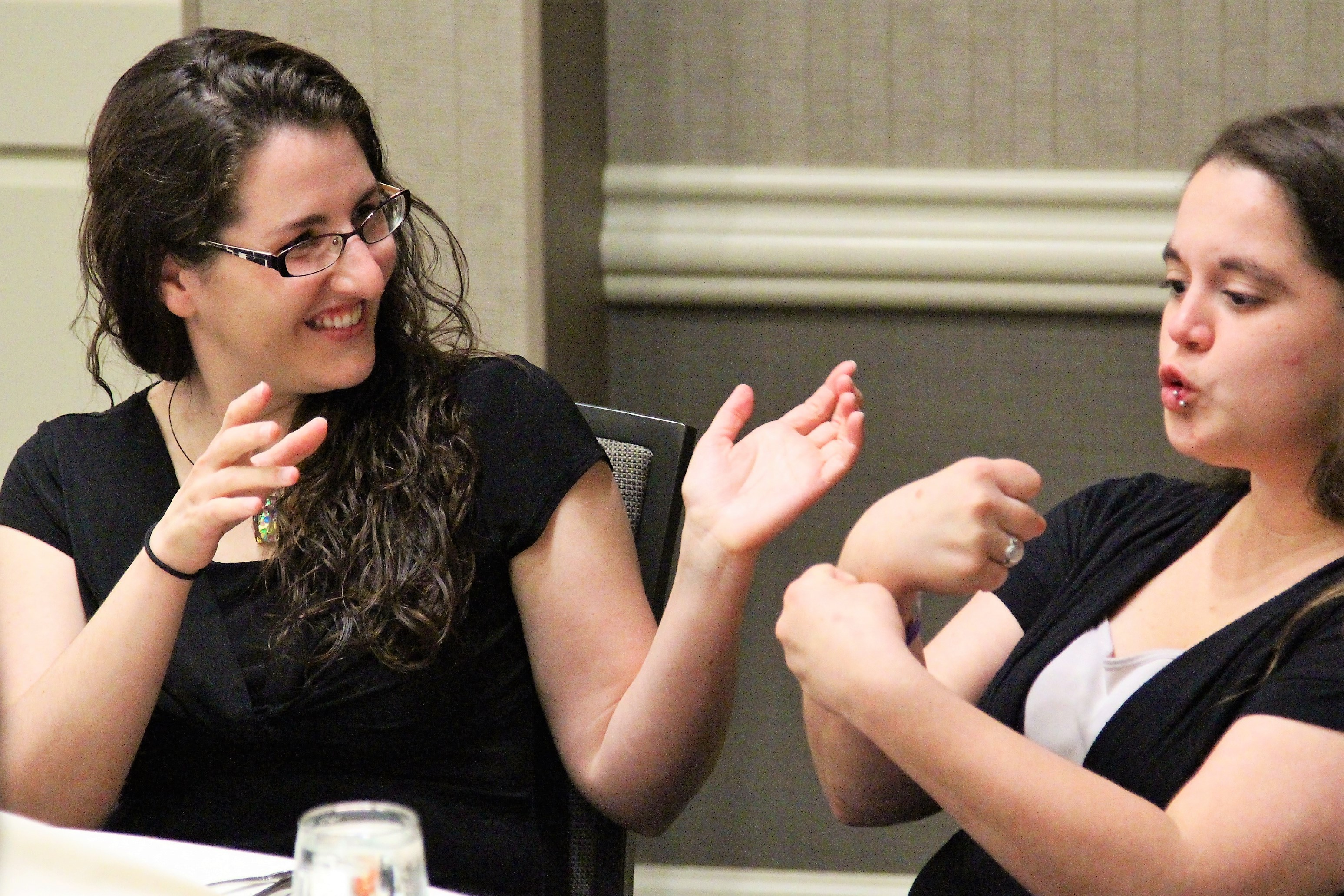 Kommunikation mittels Gebärdensprache (hier: American Sign Language / ASL) -- zwei Frauen im Gespräch (bei einem Ehemaligen-Treffen in einem Hotel in Pittsburgh in Pennsylvania, USA).